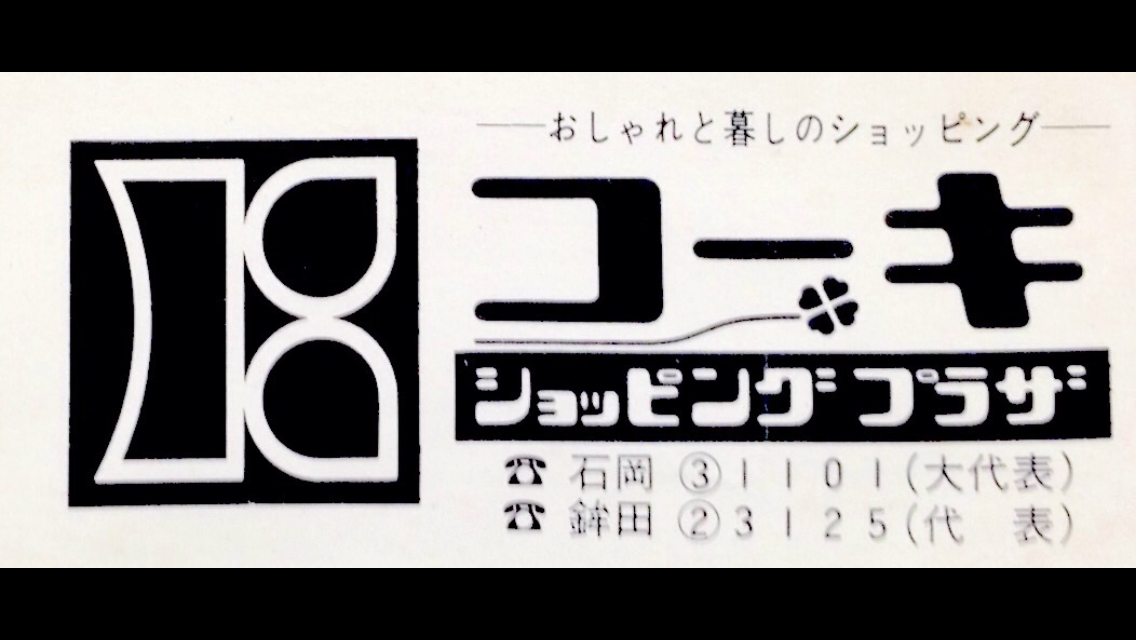 株式会社高喜２代目ロゴ